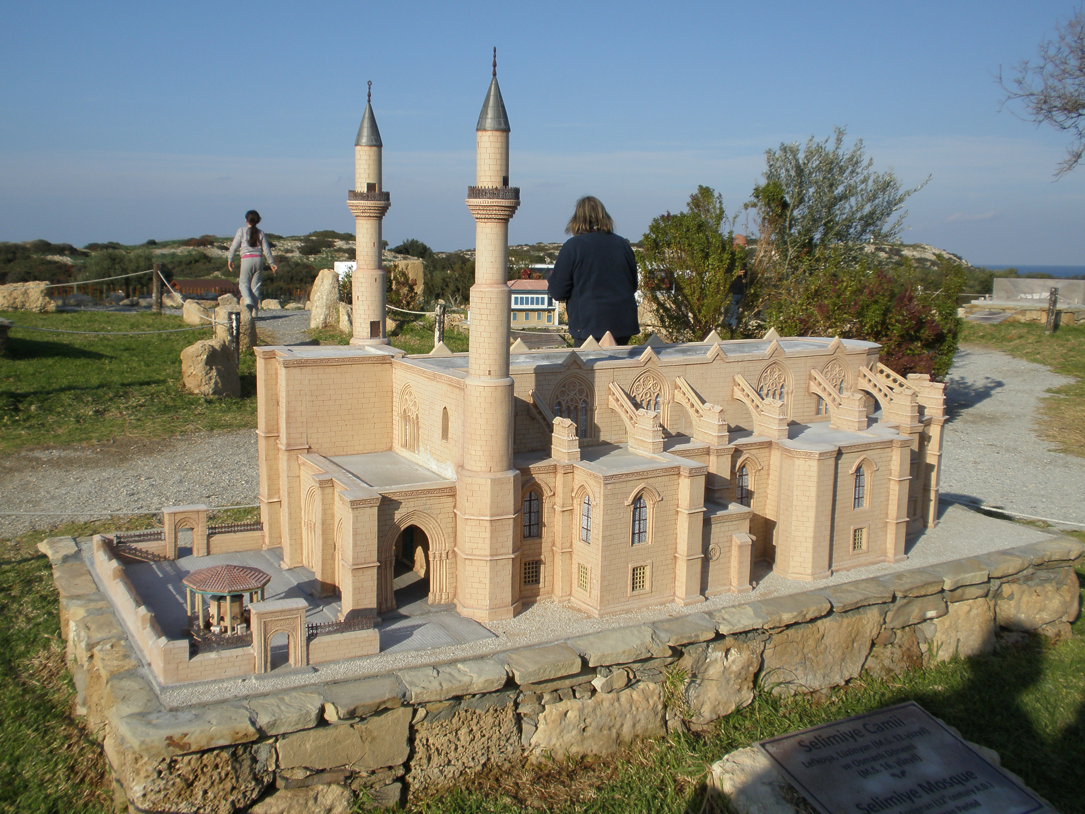 Selimiye Mosque Lefkosa